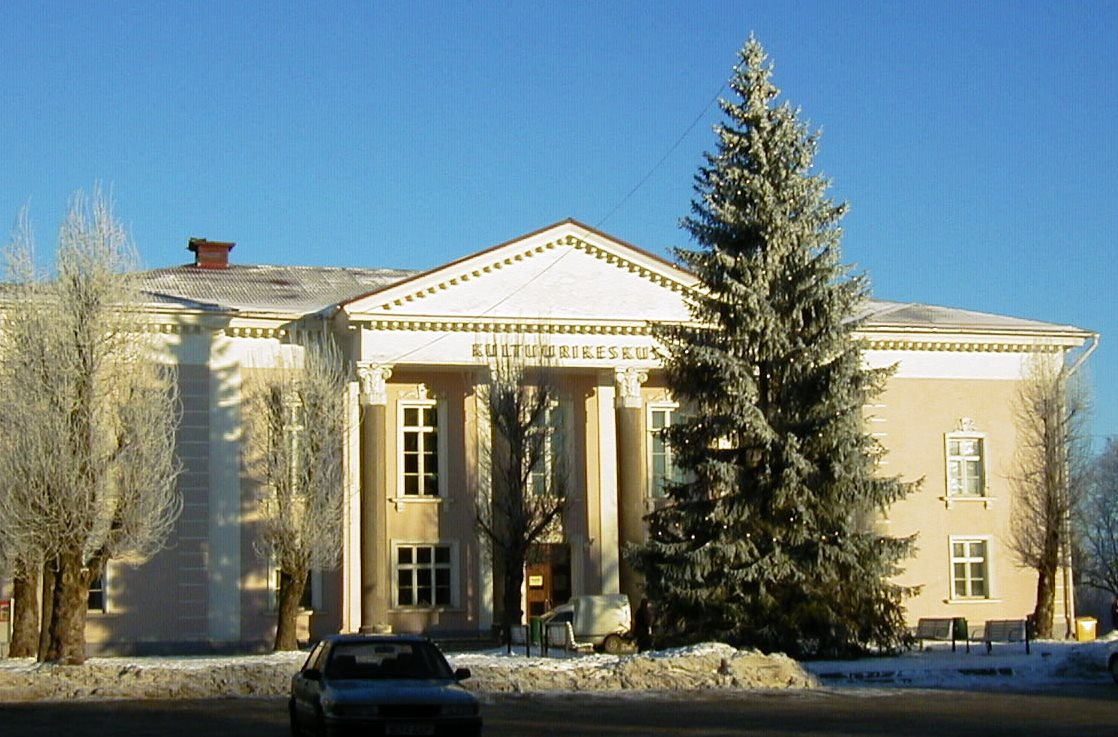 Keila Kultuurikeskus talvel